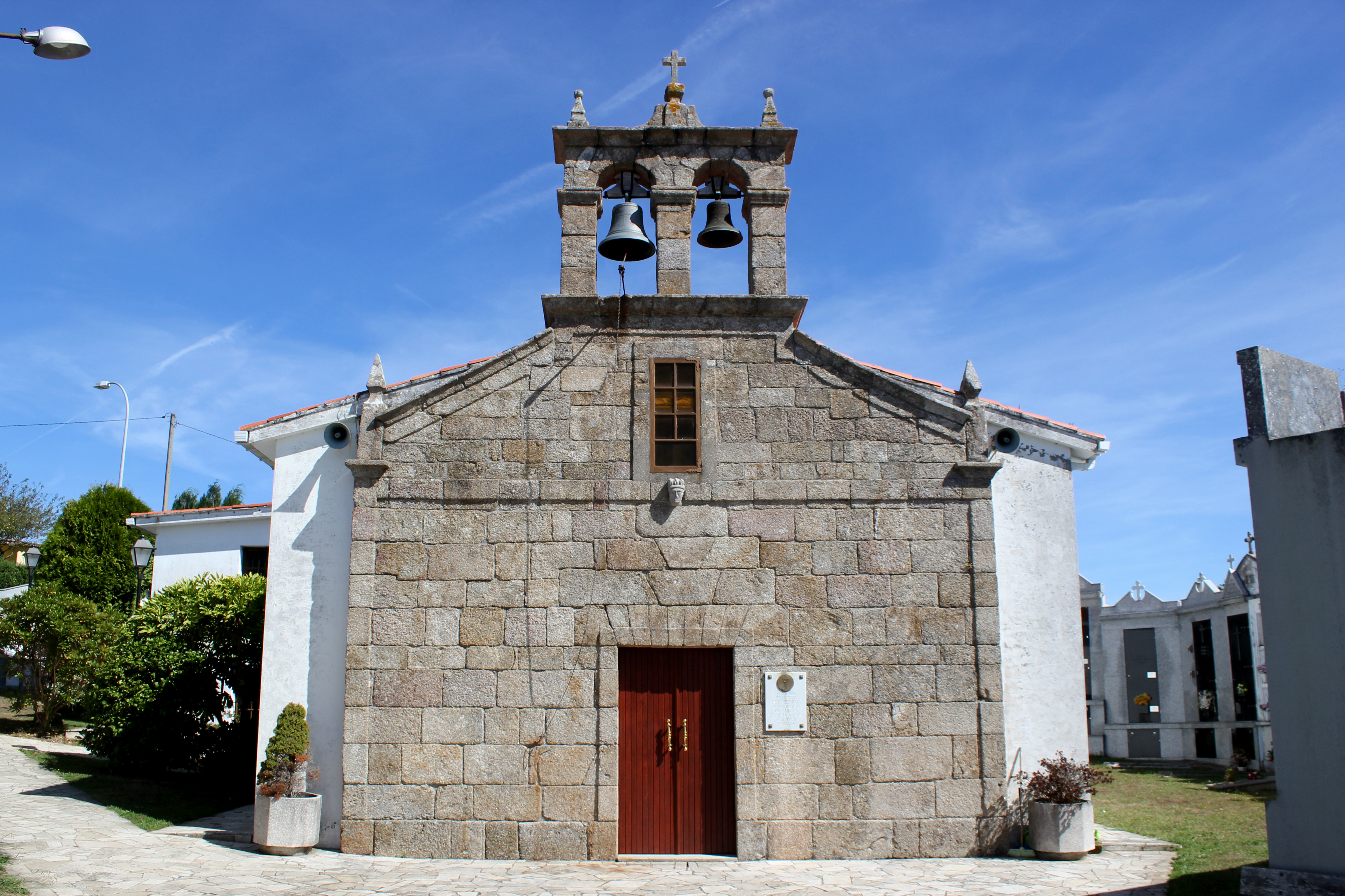 Igrexa de Tabeiaio, Carral.